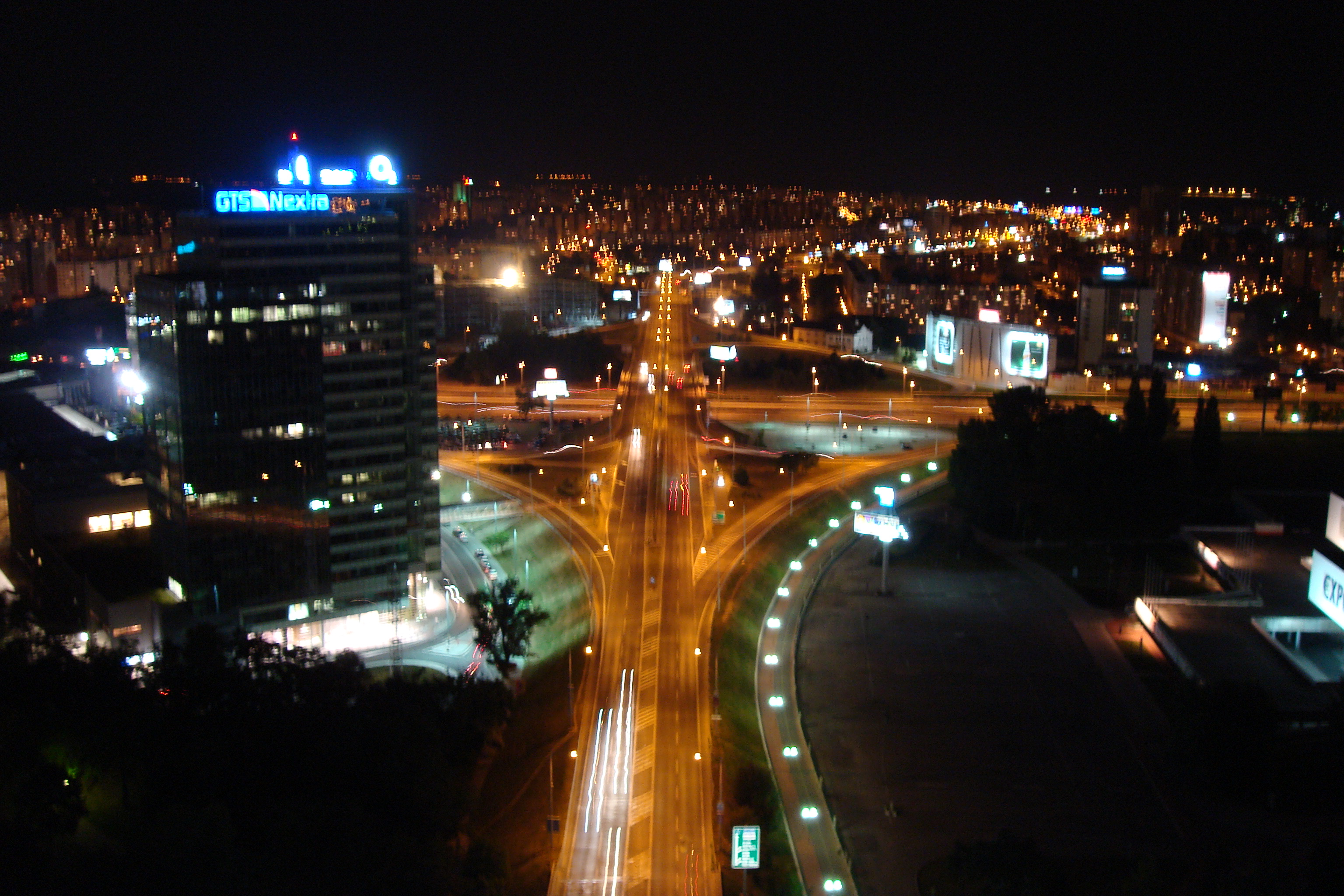 Bratislava v noci z UFO